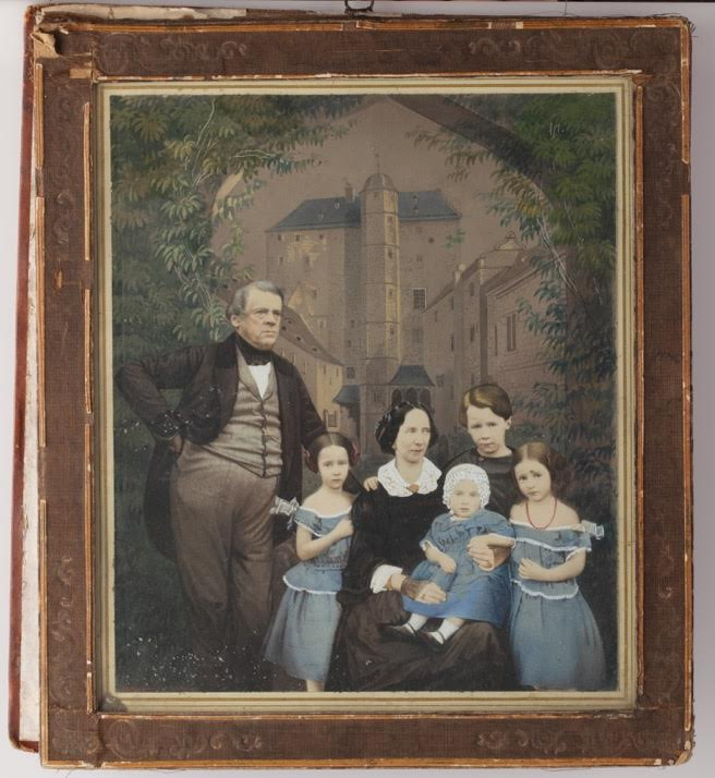 Der Gründer der Sammlungen, Carl Graf von Giech mit seiner Familie, 1856